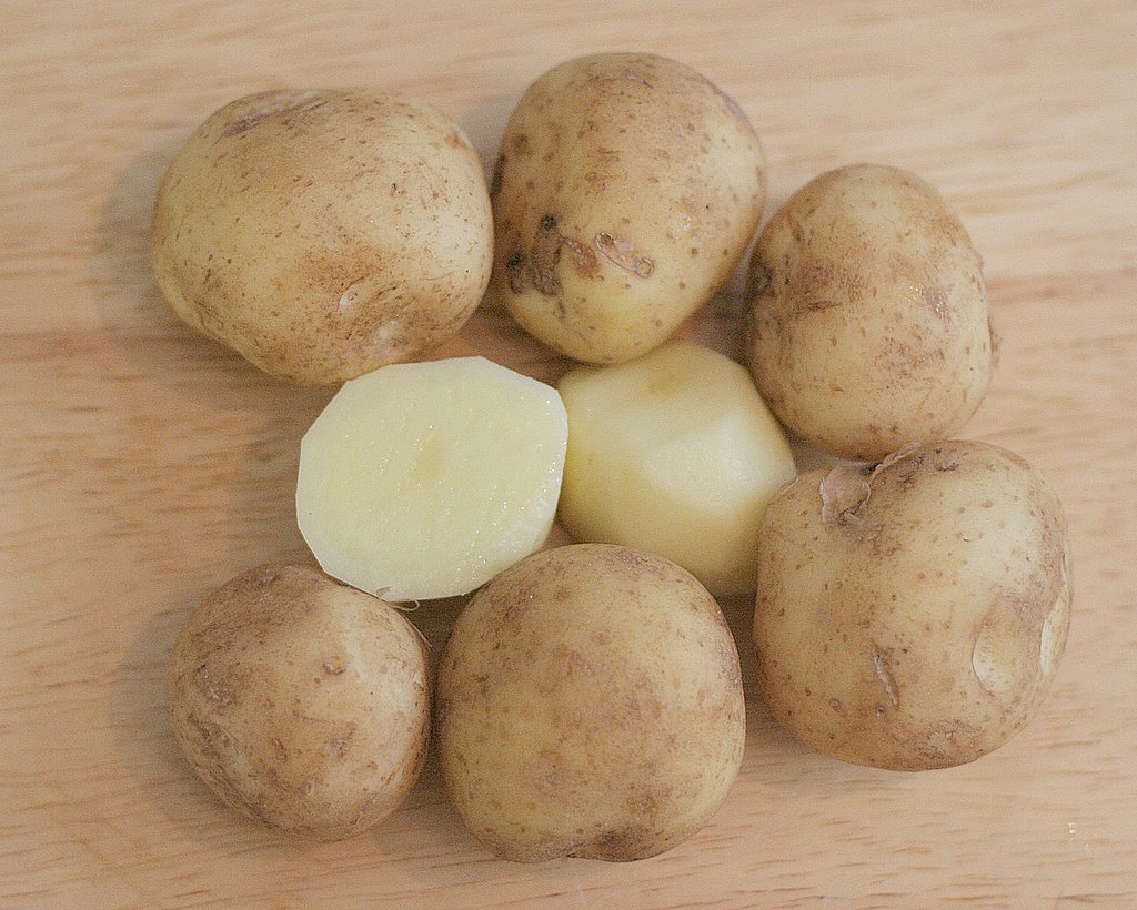 An early potato variety Hankkijan Timo. Variety: Hankkijan Timo, full name Hankkijan Timo BOR, is a popular early potato variety in Finland. It is exported too. Breeder: Hankkijan kasvinjalostus, 1975